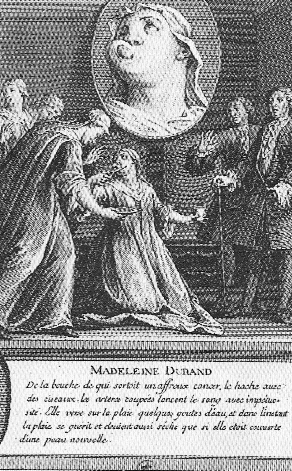 Gravure représentant un miracle janséniste (XVIIIe siècle)